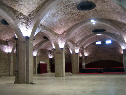 Interior d'un dels dipòsits